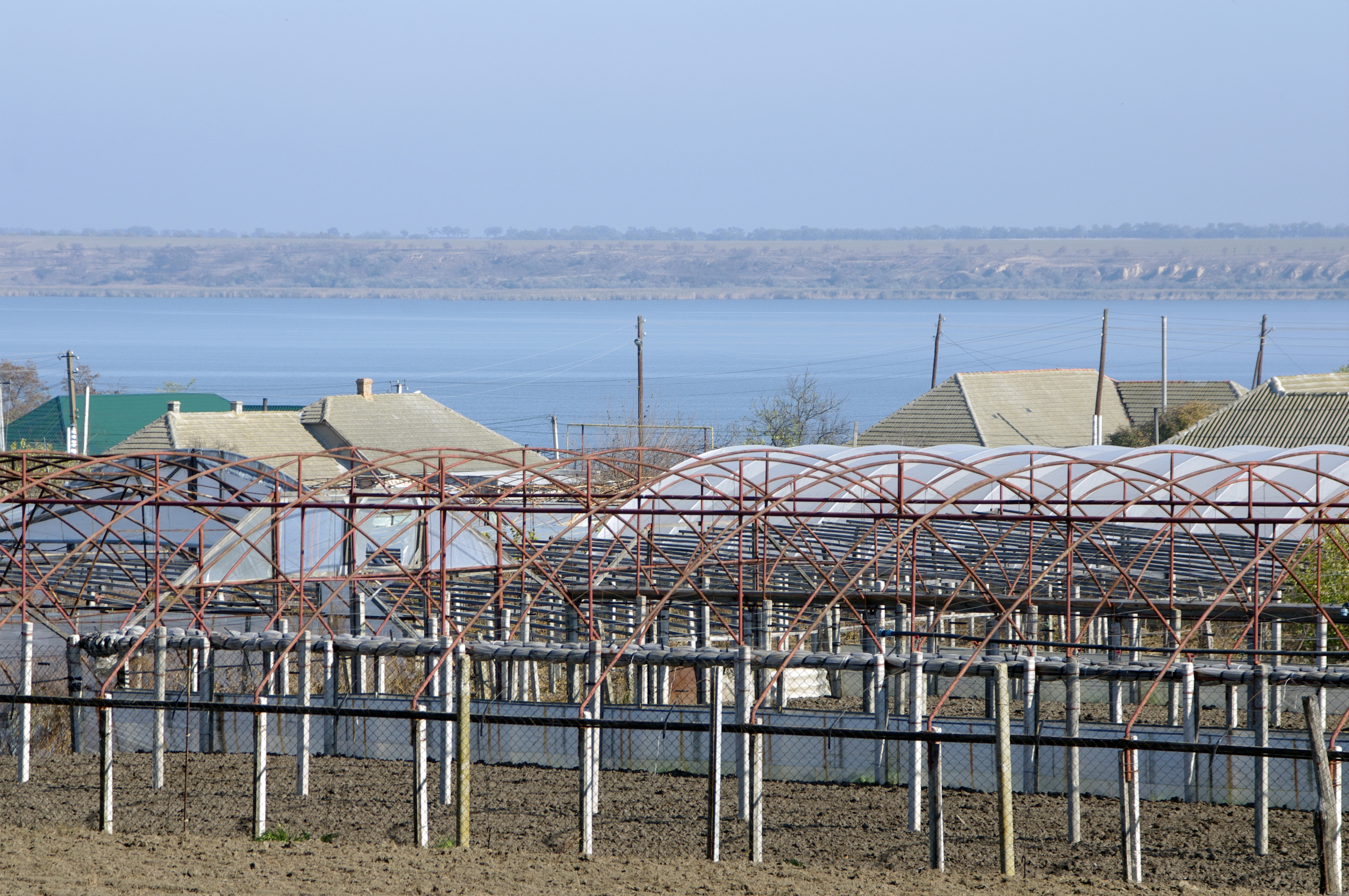 вид на лиман Катлабух (Котлабух) со стороны села поздней осенью